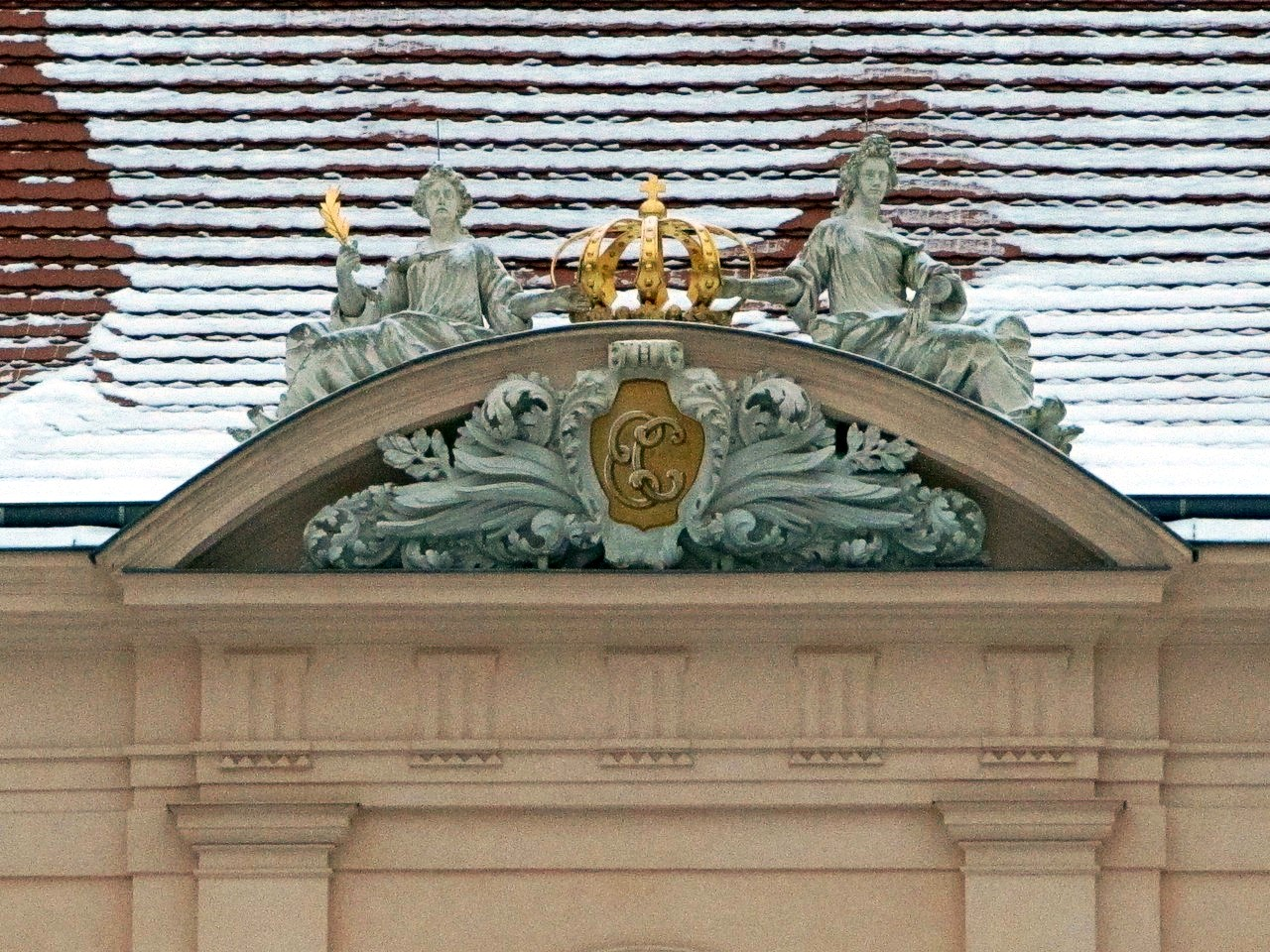 Schloss Schönhausen, Detail: Initialien "EC"